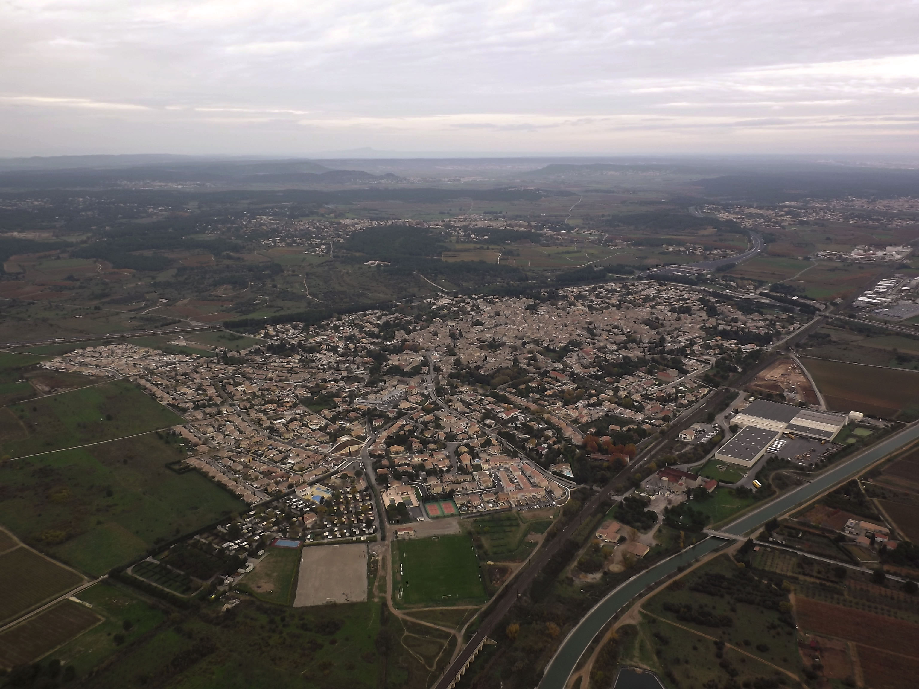 Vue Aérienne